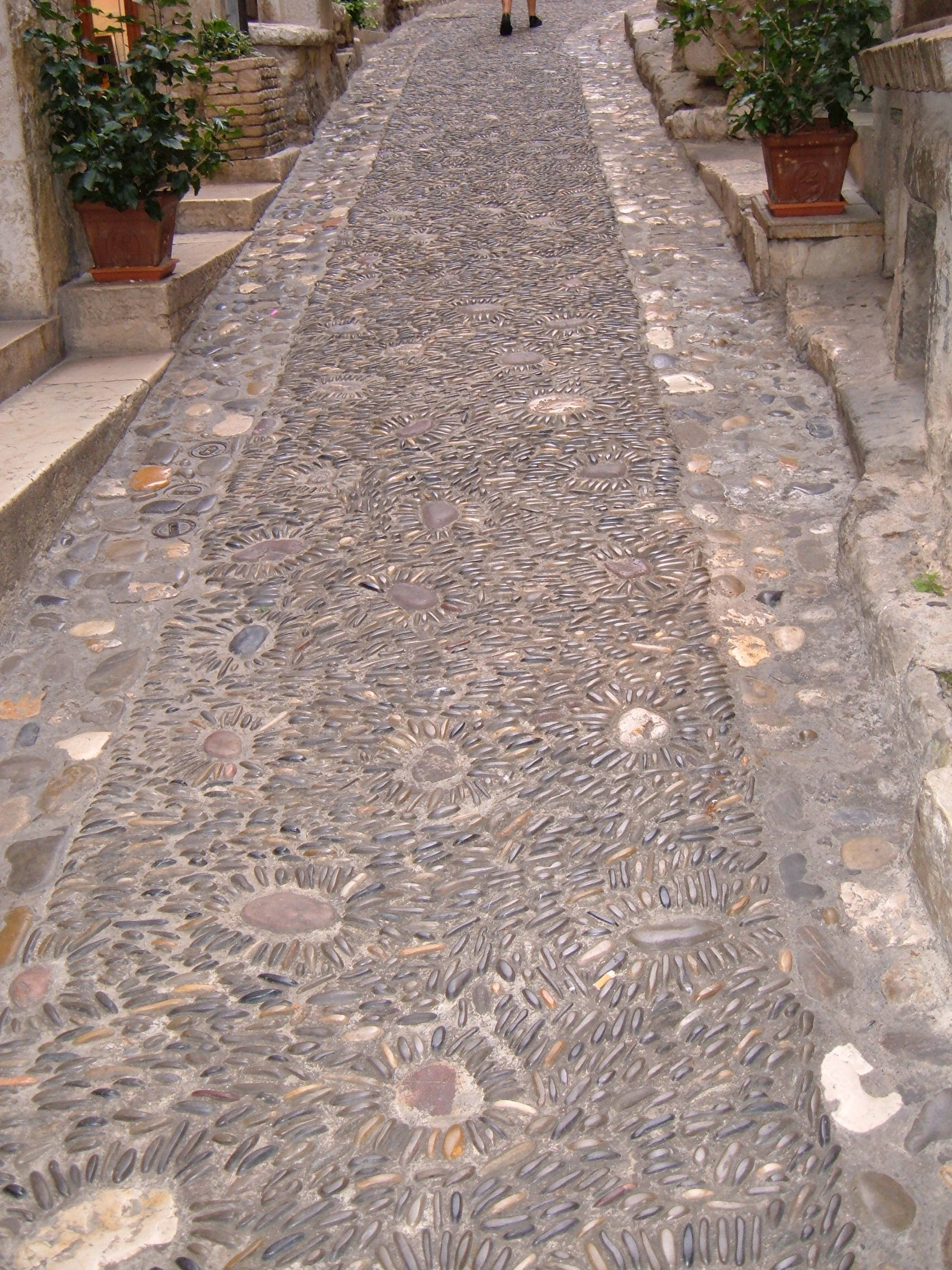 A street in Saint-Paul de Vence, Alpes-Maritimes department, France.